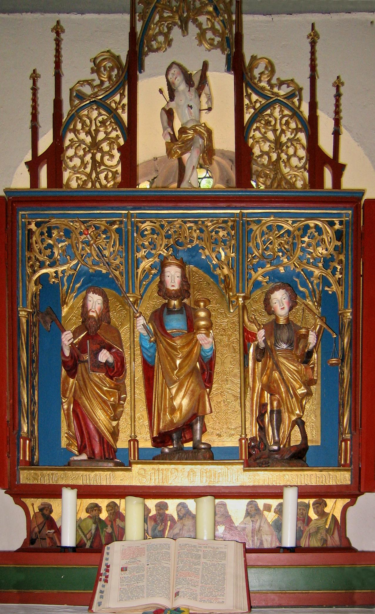 Die Kapelle Sankt Oswald im Höllental gehört politisch zu Breitnau, kirchlich aber zu HInterzarten